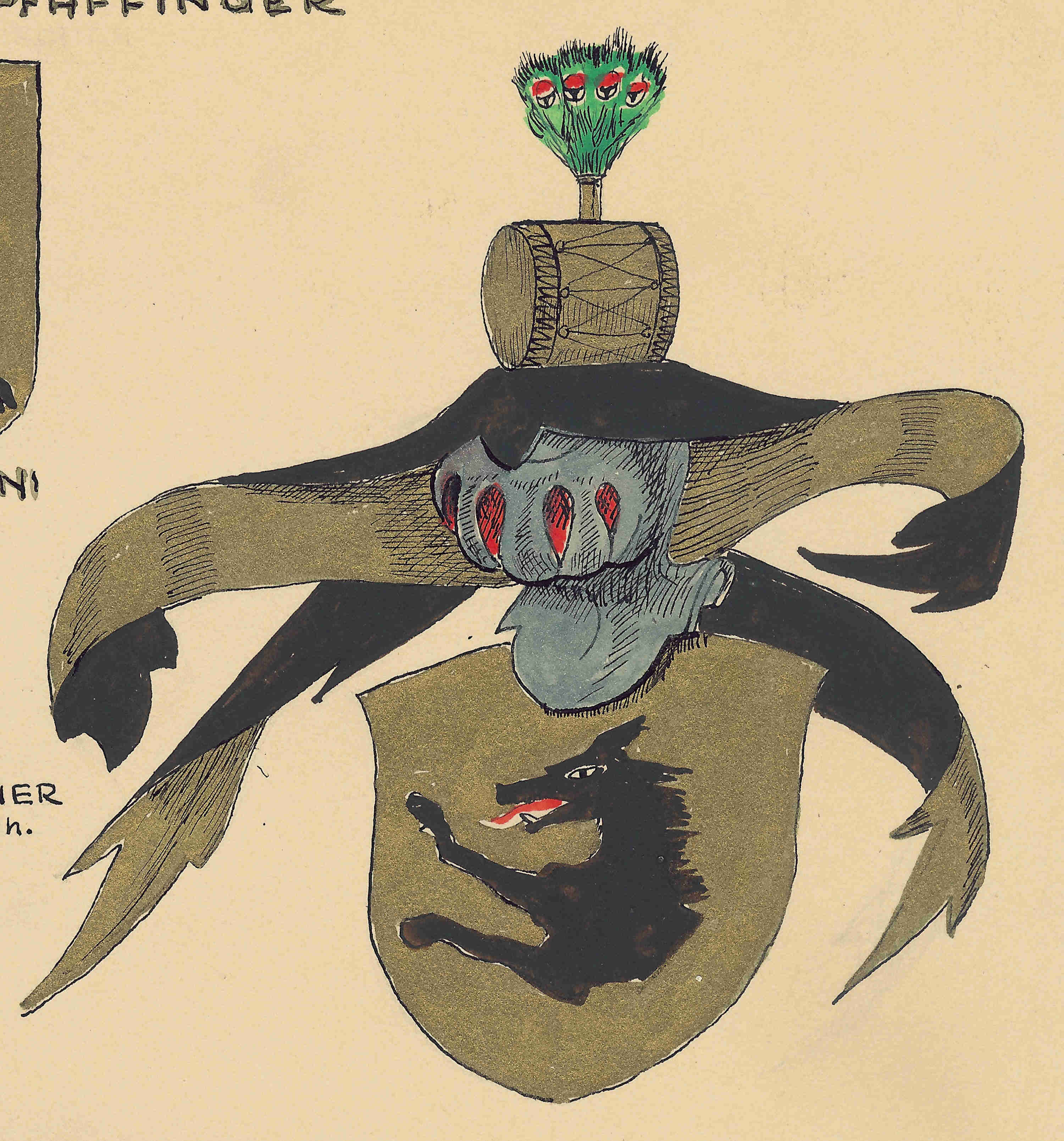 sog. Rüdenwappen der Pfäffinger, angebliches Wappen der Erbmarschälle von Niederbayern (Landsberg